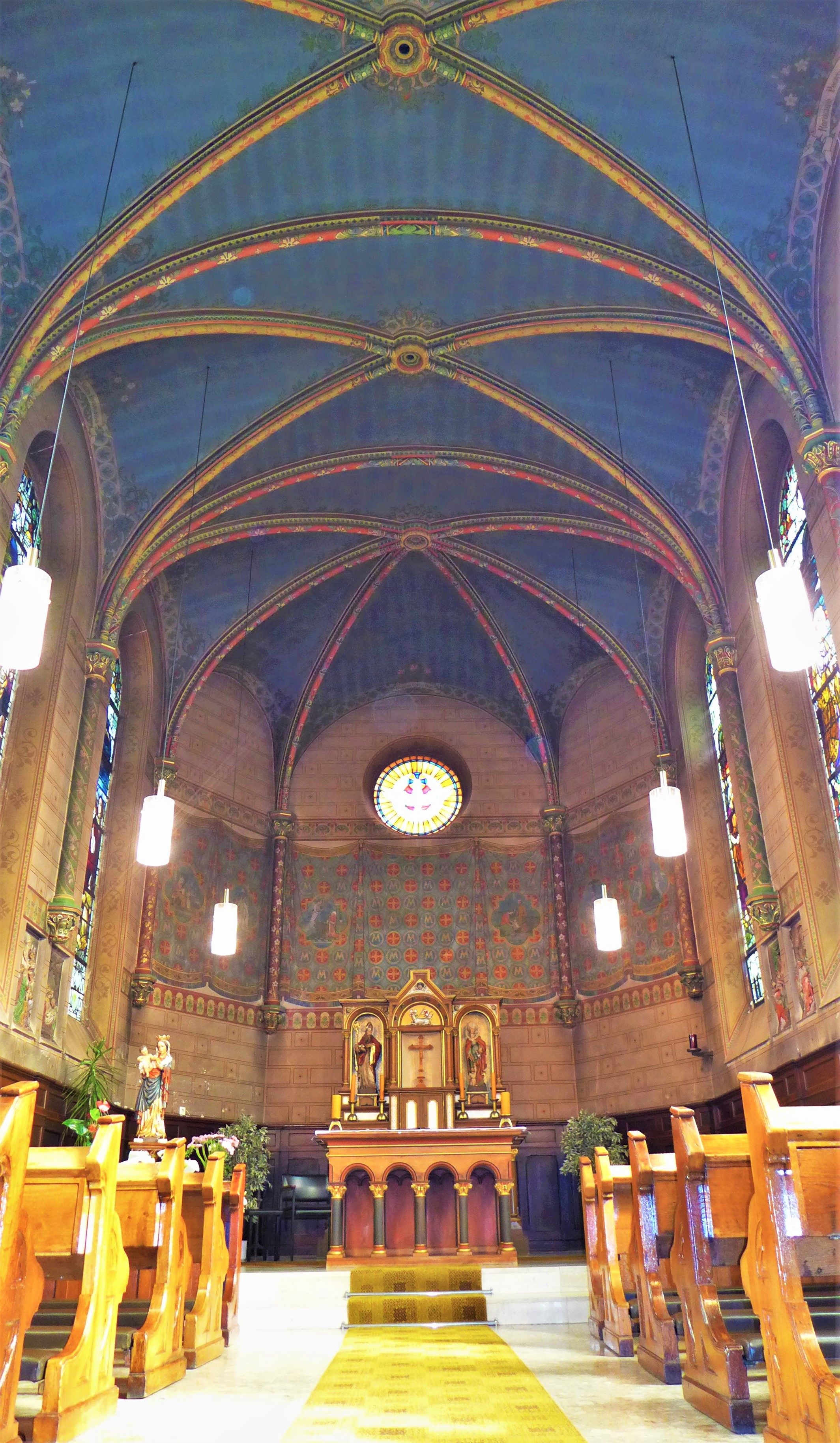 Wallerfangen, Krankenhauskapelle im neoromanischen Stil mit bauzeitlicher Ausmalung